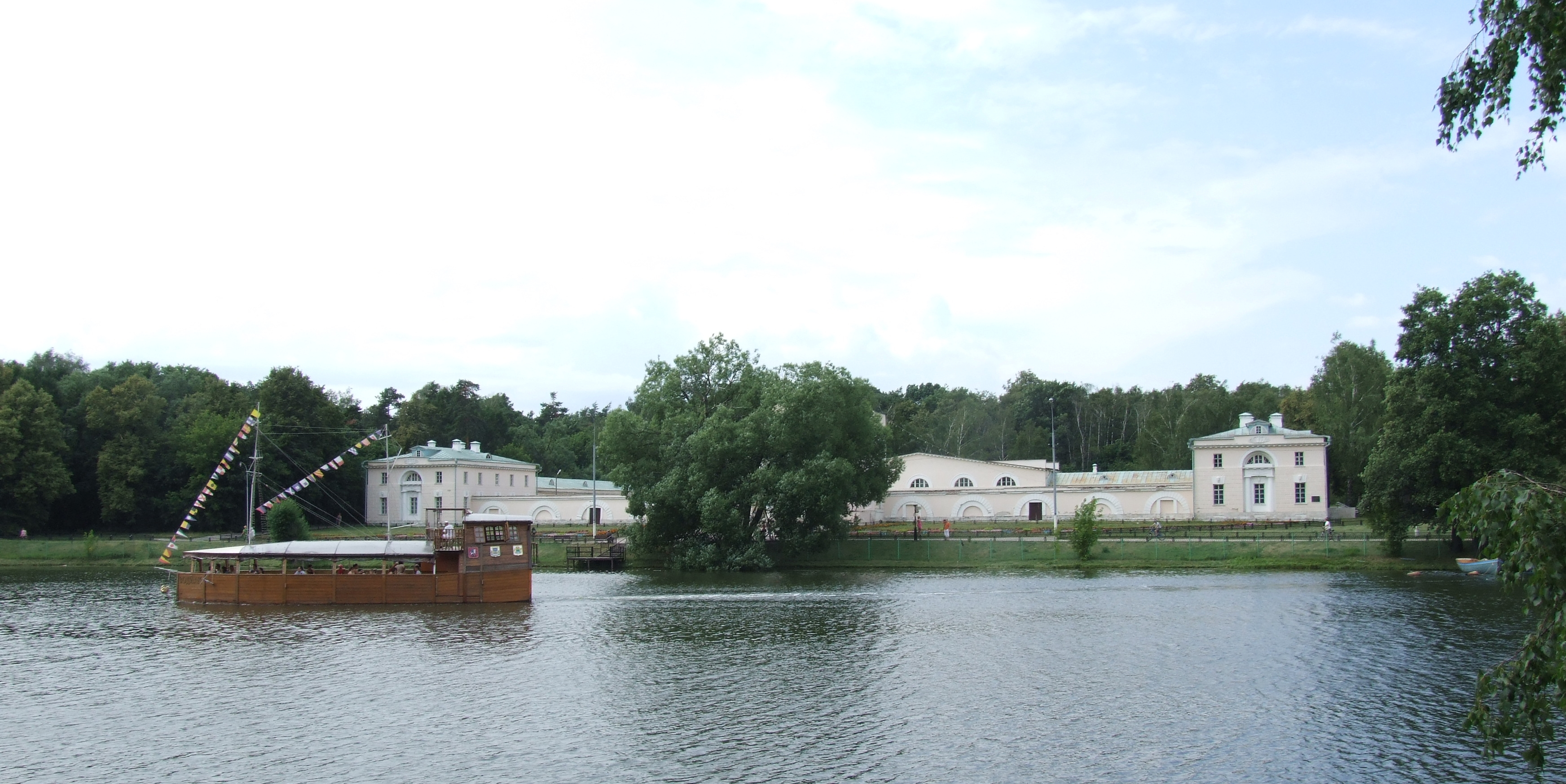 Усадьба Кузьминки